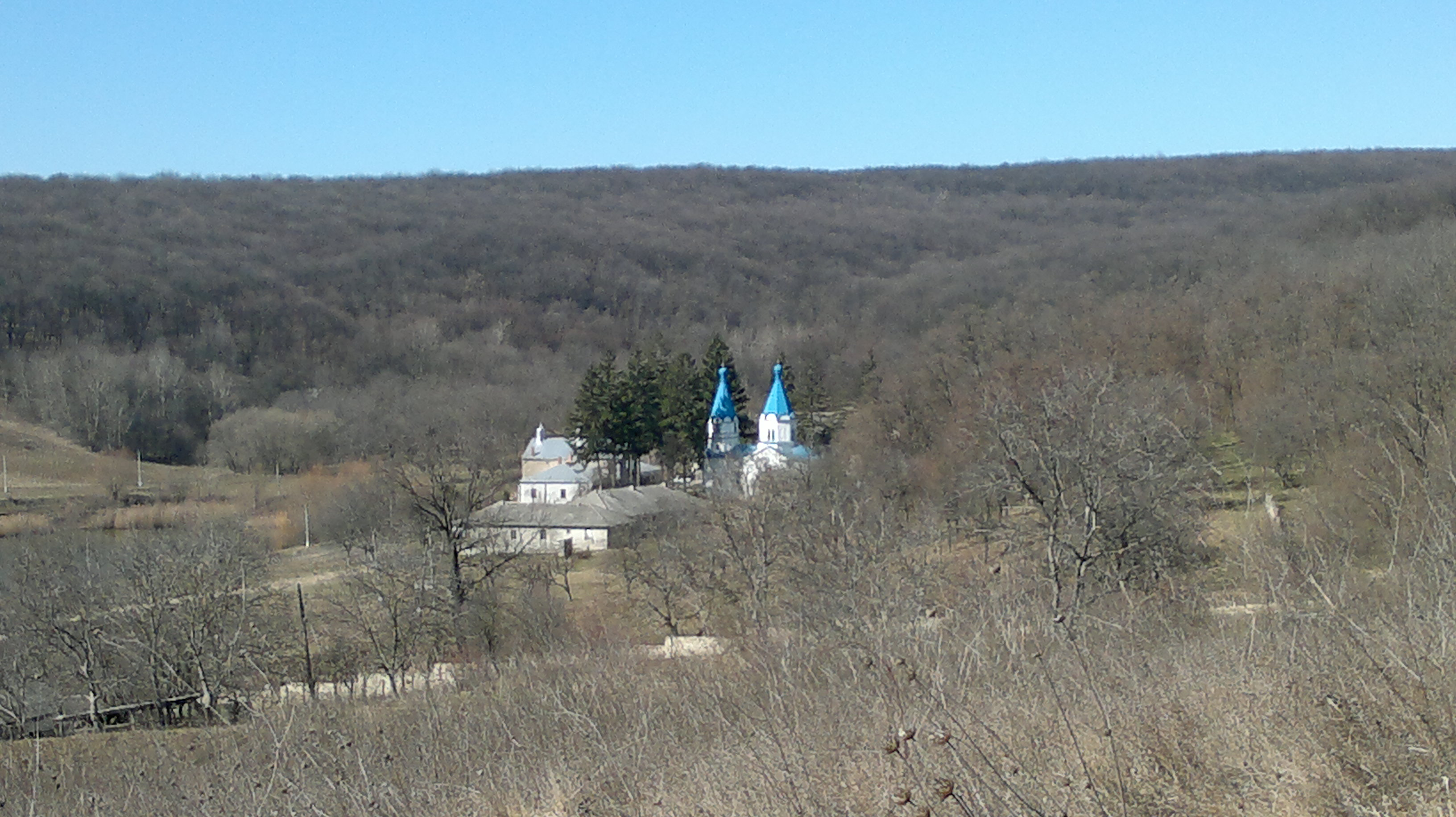 Vedere a Mănăstirii Țigănești, Republica Moldova.